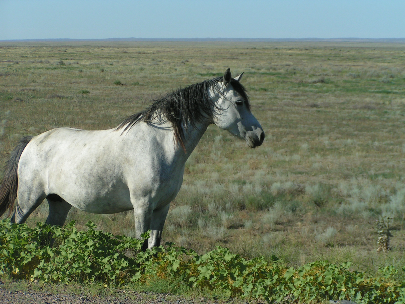 Horse